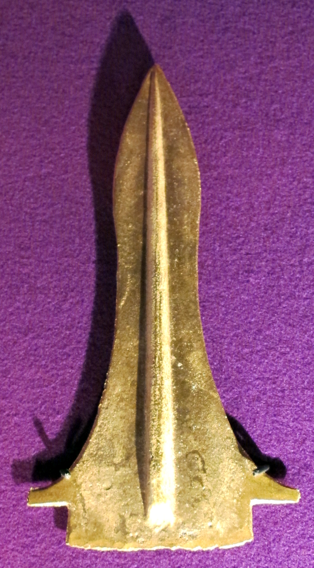 Età del bronzo, punta di lancia o pugnale d'oro, XVII sec. ac.